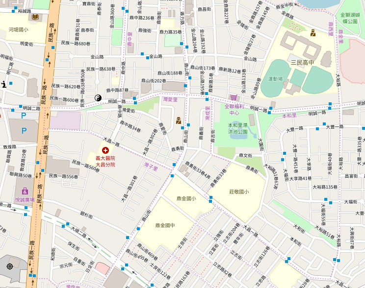 高雄灣仔內之地圖